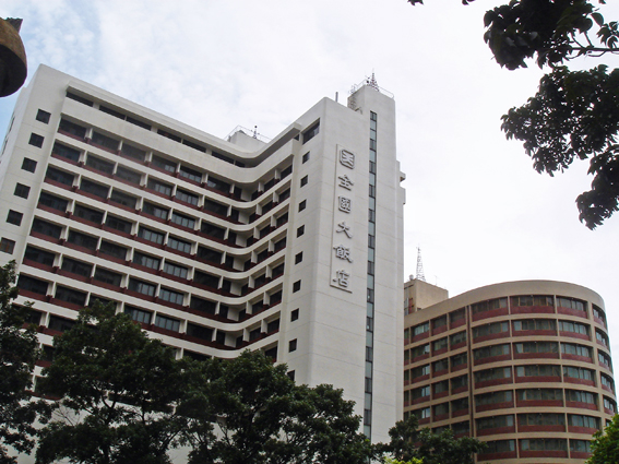 台中市的全國大飯店。